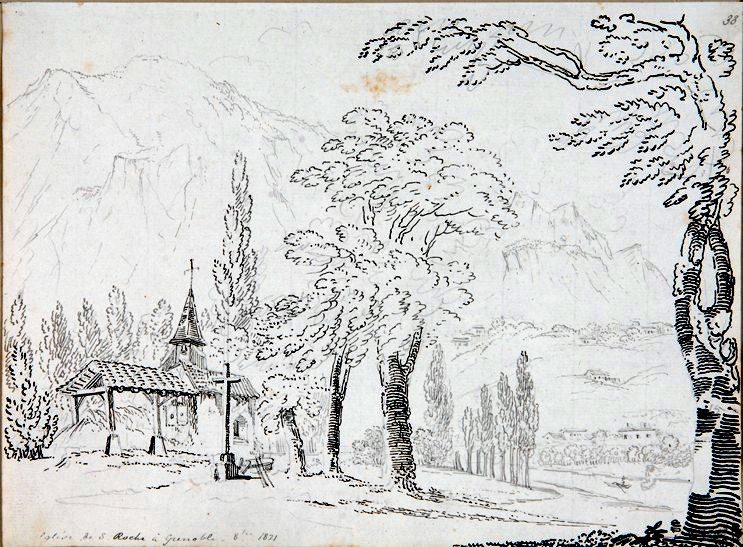 Ancienne chapelle Saint-Roch en octobre 1820. John Claude Nattes, Mine de plomb et encre noire sur papier. 20,9 x 28,4 , Collection particulière © Denis Vinçon, Musée de l'Ancien Evêché, Grenoble